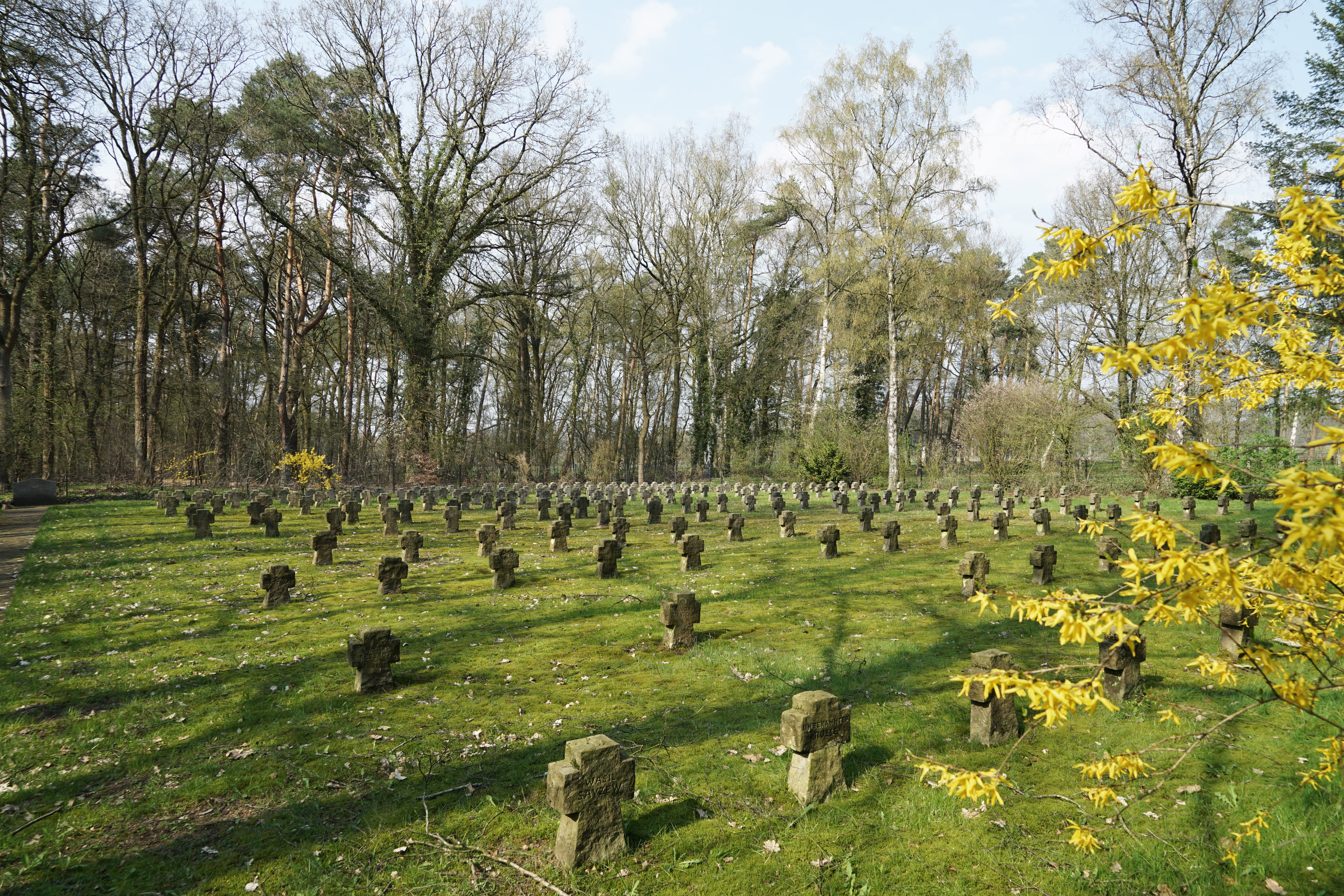 Kriegsgräberstätte Sannum, Gesamtübersicht im April 2019